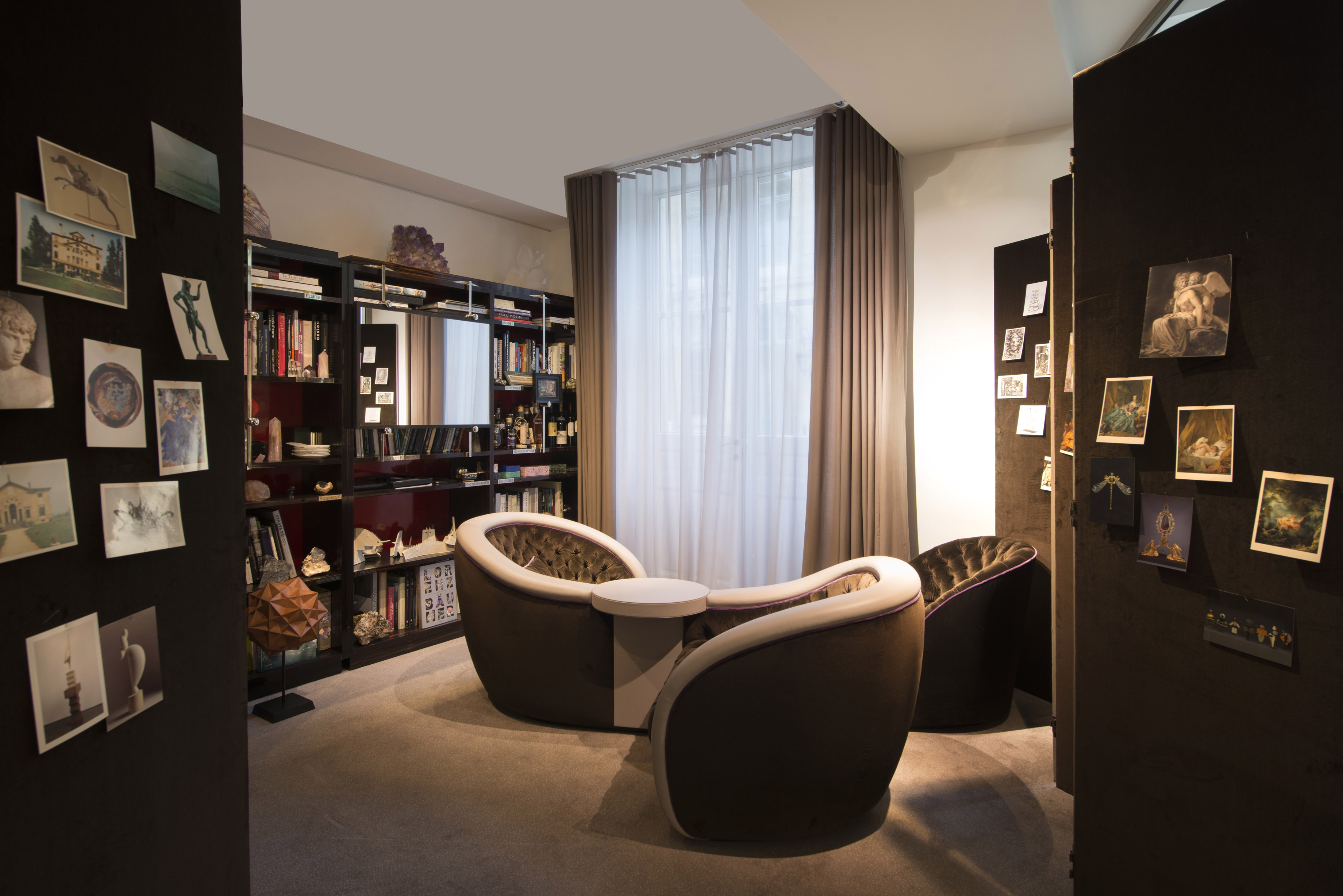 Nouvel écrin Lorenz Bäumer - Confident -19, place Vendôme, 75001 Paris